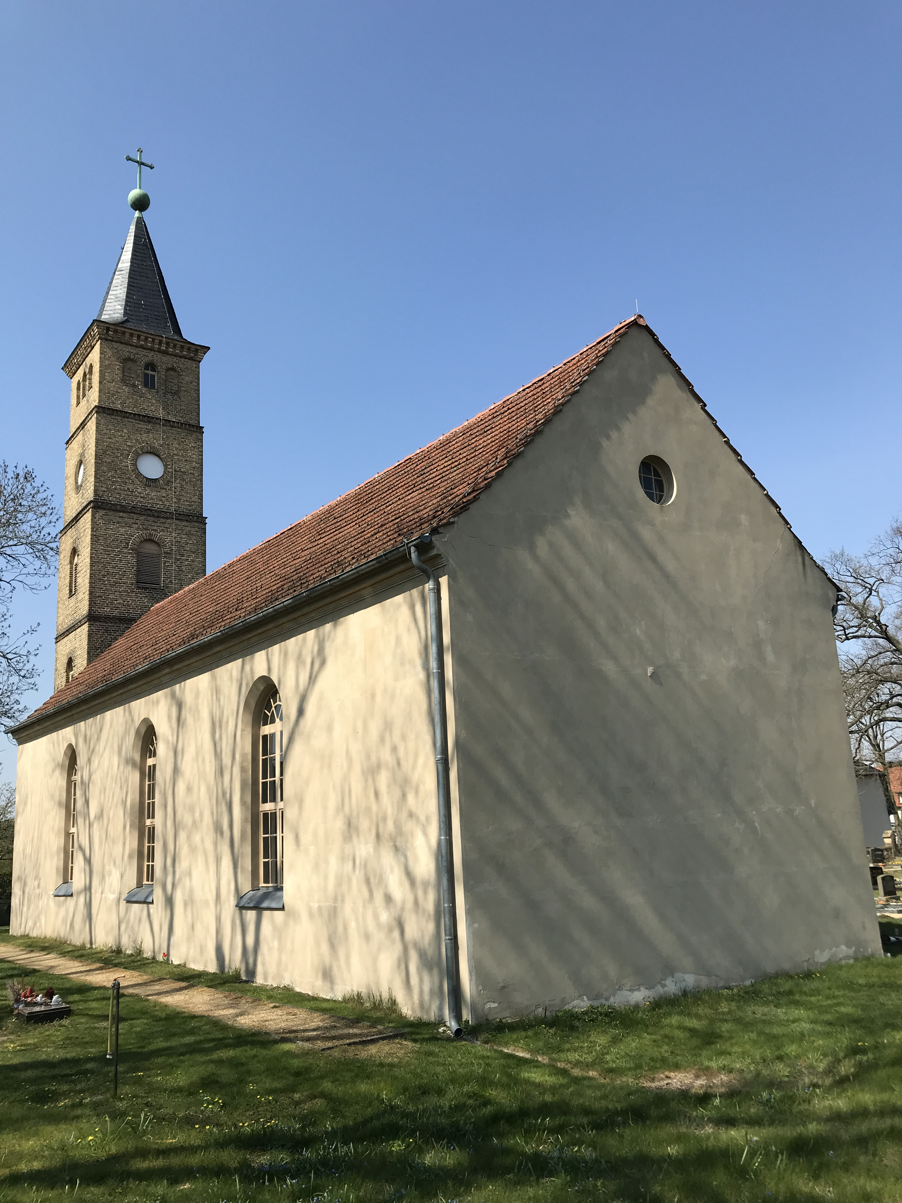 Die evangelische Dorfkirche Bliesendorf ist eine neugotische Saalkirche in Bliesendorf, einem Ortsteil der Stadt Werder (Havel) im Landkreis Potsdam-Mittelmark im Land Brandenburg.